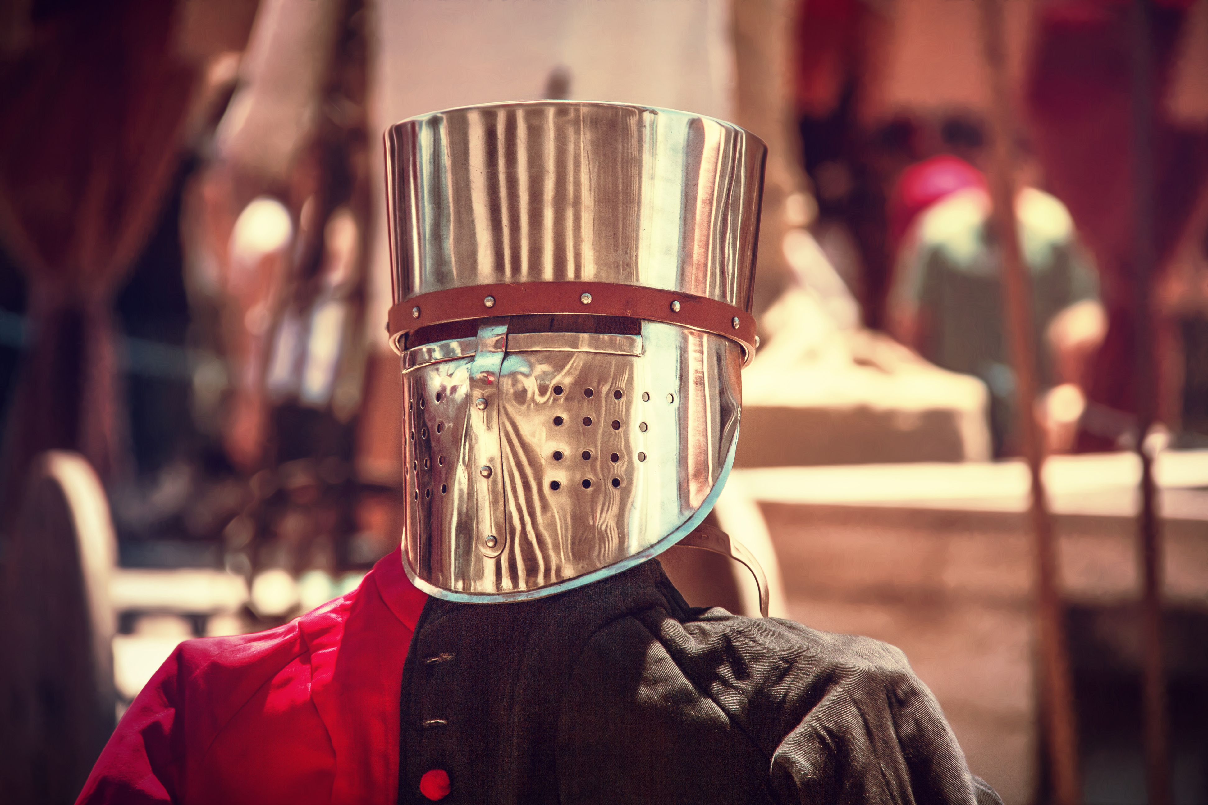 Zaragoza, España